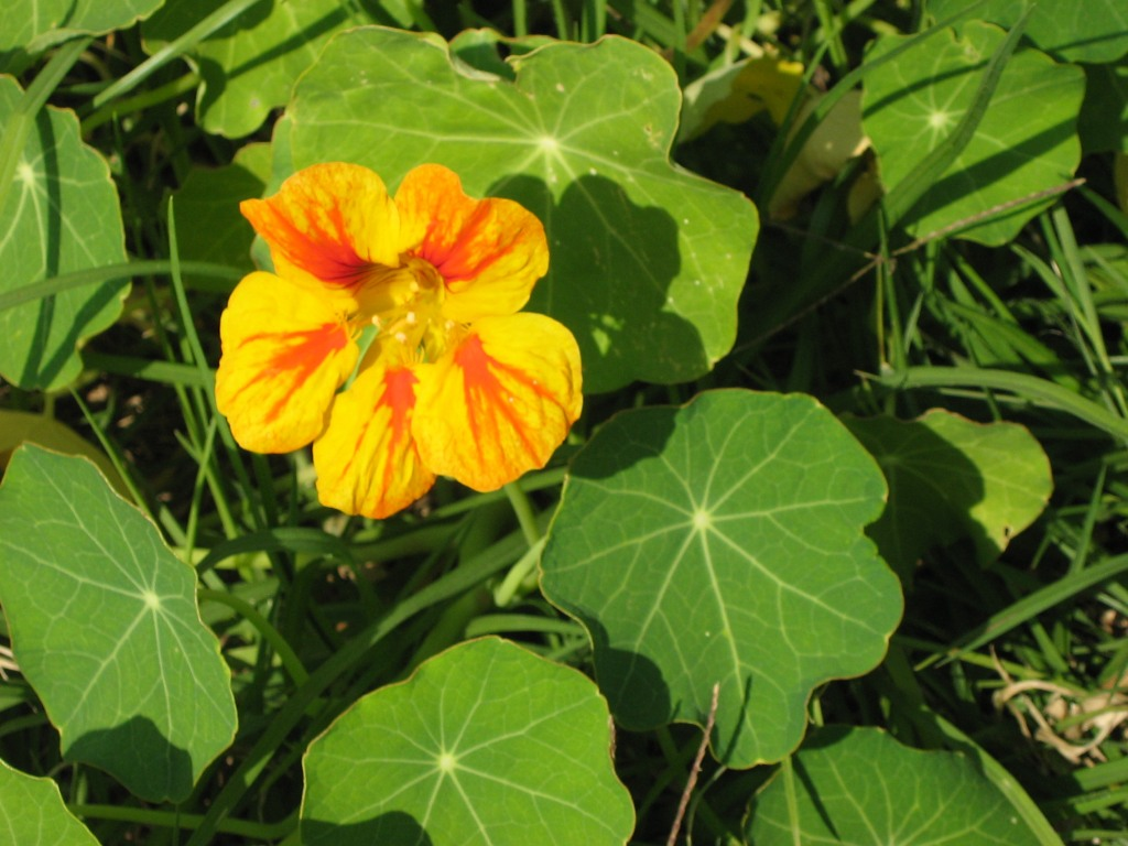 כובע נזיר פורח. צולם ע" י אילן שמעוני